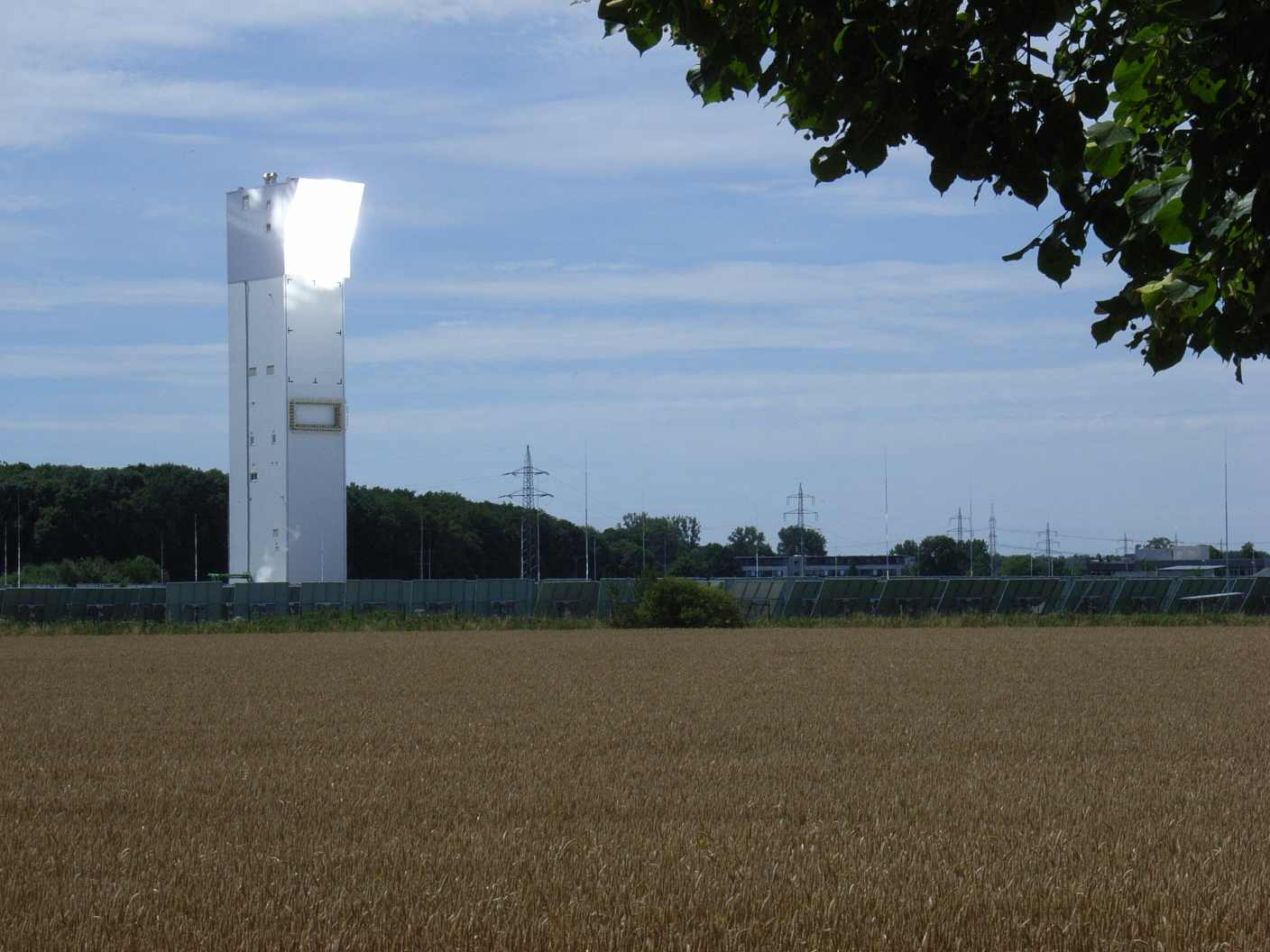 Solarturm Jülich